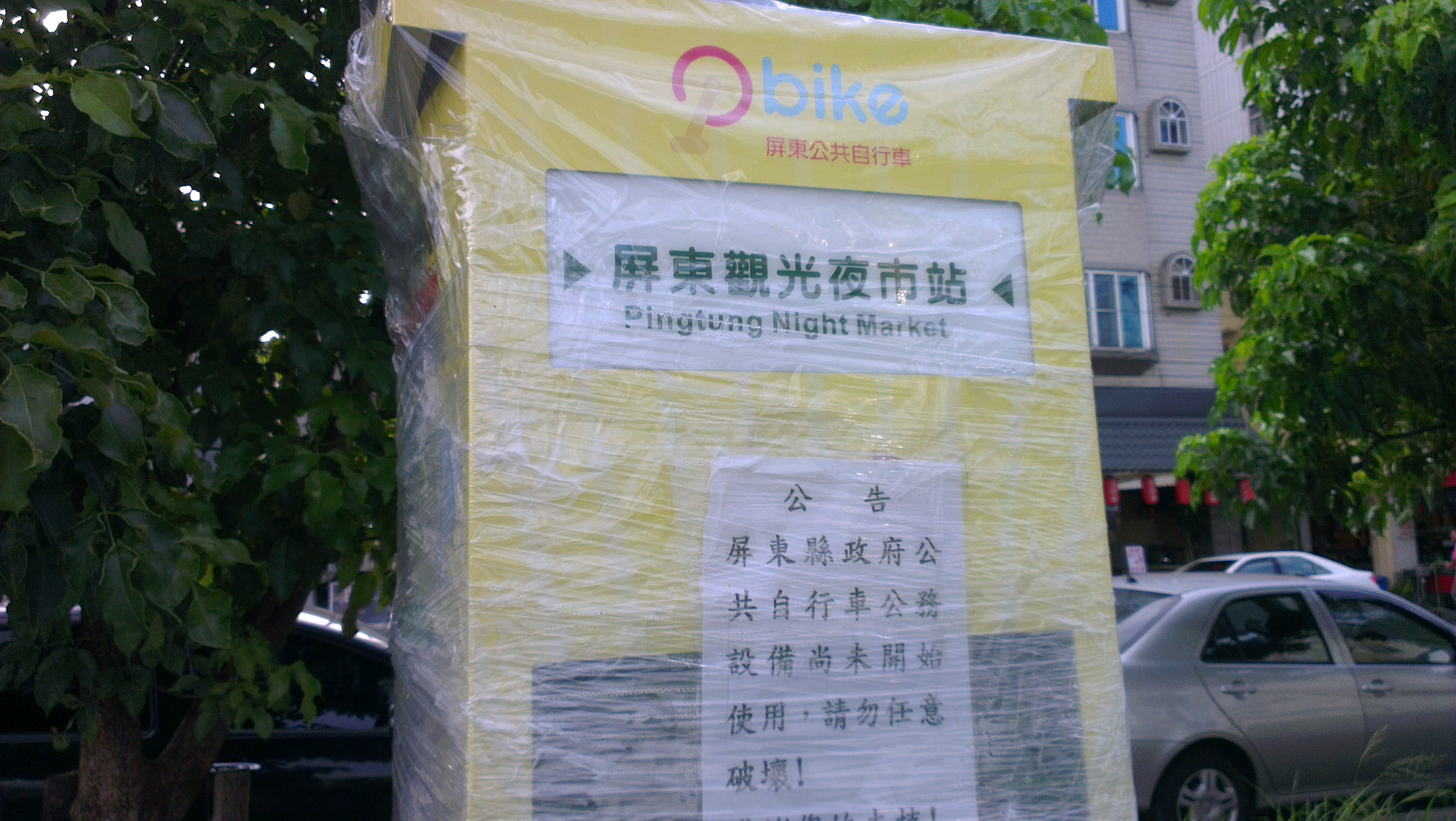 屏東市公共自行車的LOGO